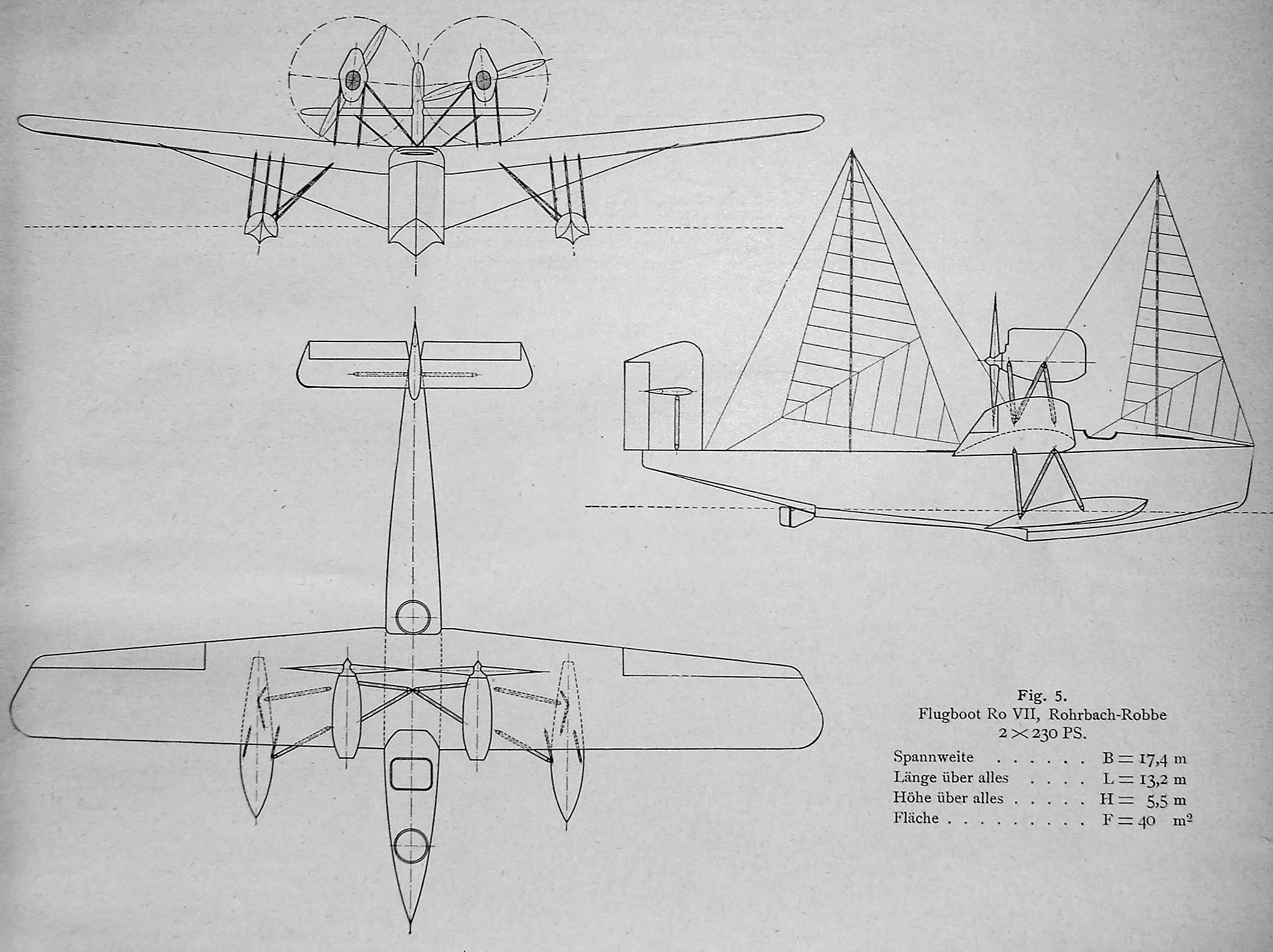 Zeichnung des Flugbootes Rohrbach Robbe Ro.VII